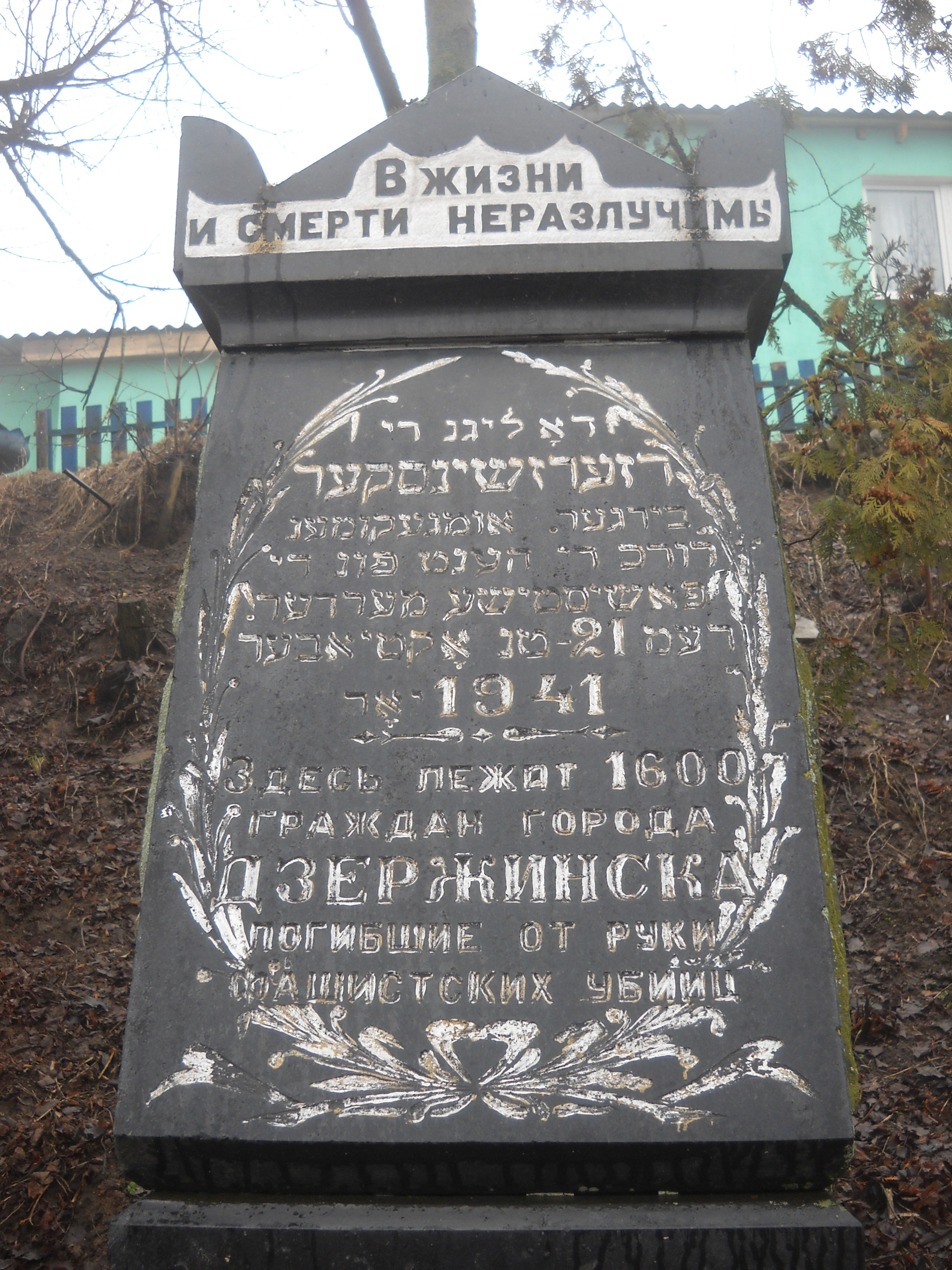 Надпись (на идише и русском языке) на памятнике на месте массового убийства евреев - узников гетто в Дзержинске (Койданово) 21 октября 1941 года.